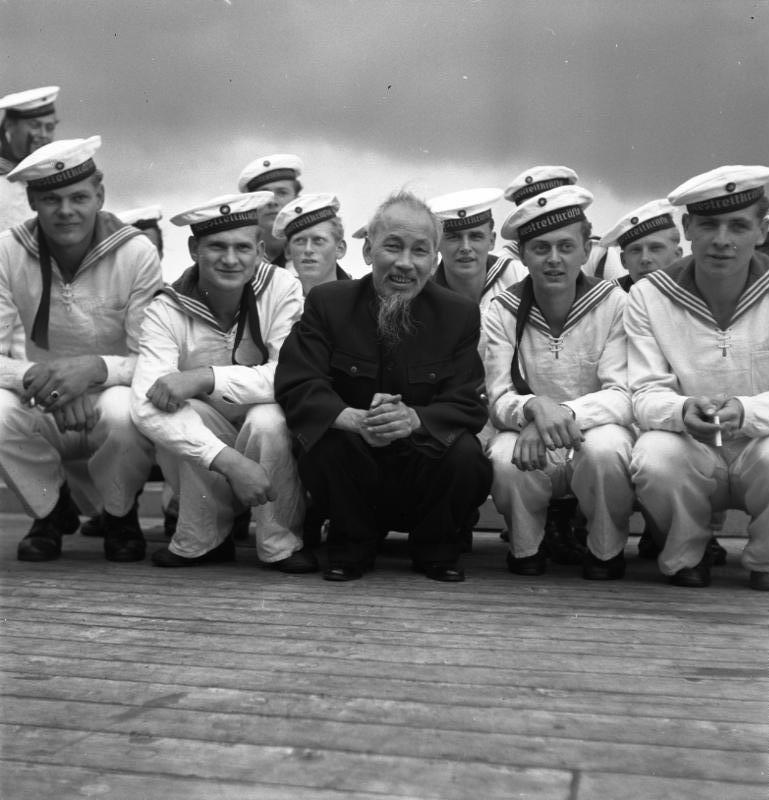 Stralsund, Ho Chi Minh mit Matrosen der NVA Zentralbild, Junge, 28.7.1957, Ho chi Minh in Stralsund und auf der Insel Riems. Der Präsident der Demokratischen Republik Vietnams Ho chi Minh , und seine Begleitung statteten am 27.7.1957 der Volkswerft Stralsund und der Insel Riems einen Besuch ab. Während des Besuchs fand eine Kundgebung mit den Werktätigen der Volkswerft statt, bei der ein Logger vom Stapel gelassen wurde. UBz: Auf einem Minenleg- und -räumboot unserer Nationalen Seestreitkräfte unternahm Präsident Ho chi Minh eine Rundfahrt auf der Ostsee. Inmitten von jungen Matrosen läßt sich Ho chi Minh fotografieren. Abgebildete Personen: Ho Chi Minh: Präsident, DR Vietnam (GND 11855168X)